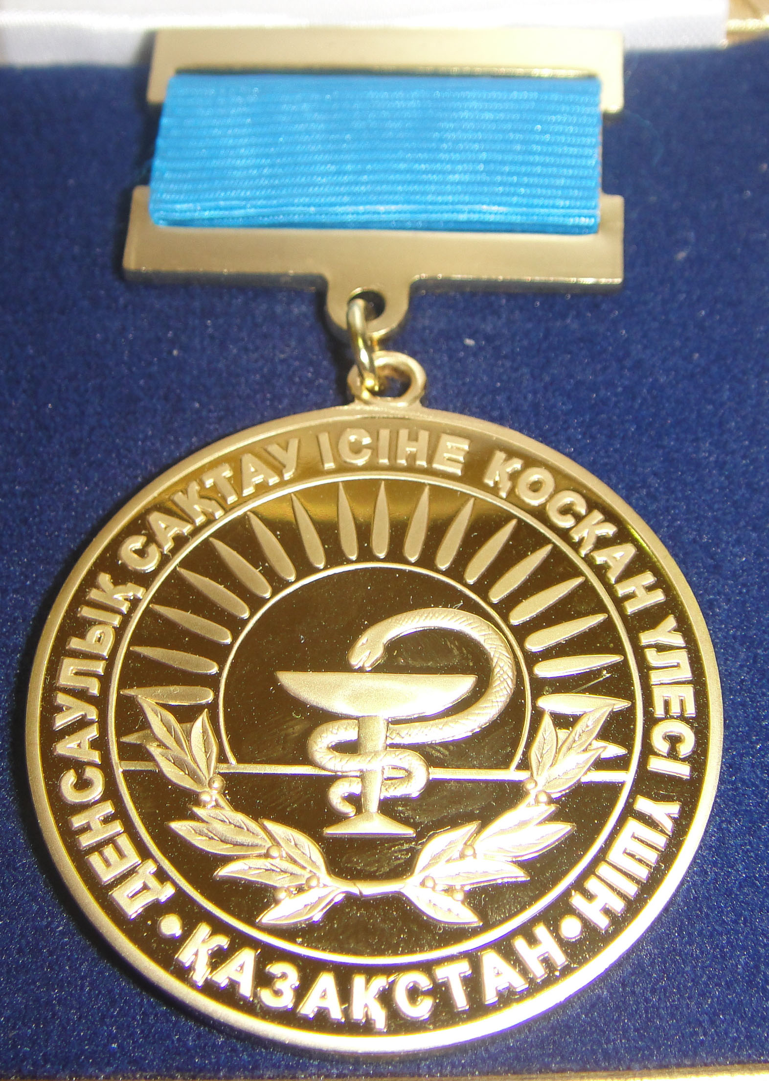 Нагрудный знак Республики Казахстан «За вклад в развитие здравоохранения»